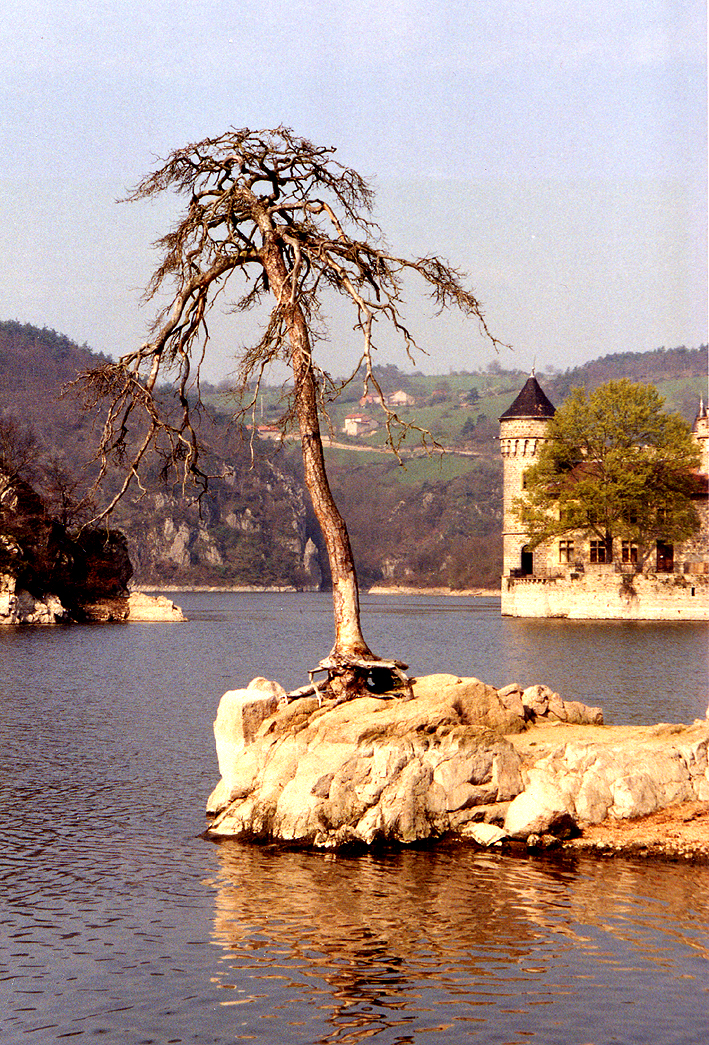 Sur la Loire en Avril 1991. Château de La Roche, Saint-Priest-la-Roche, Loire, France